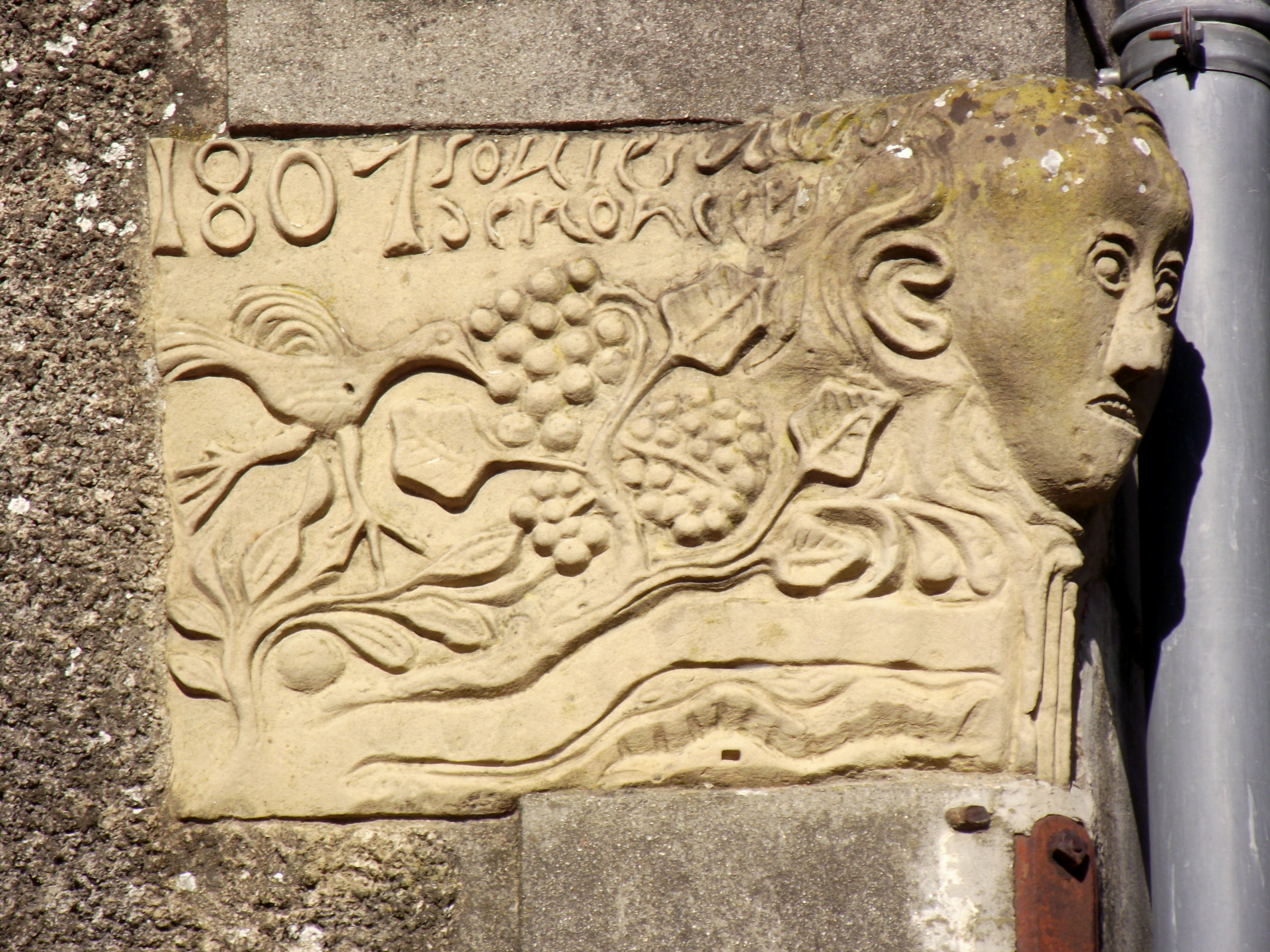 Pierre angulaire d'un bâtiment au Nord-Est de la place Jean Sénac (Miélan, Gers, France